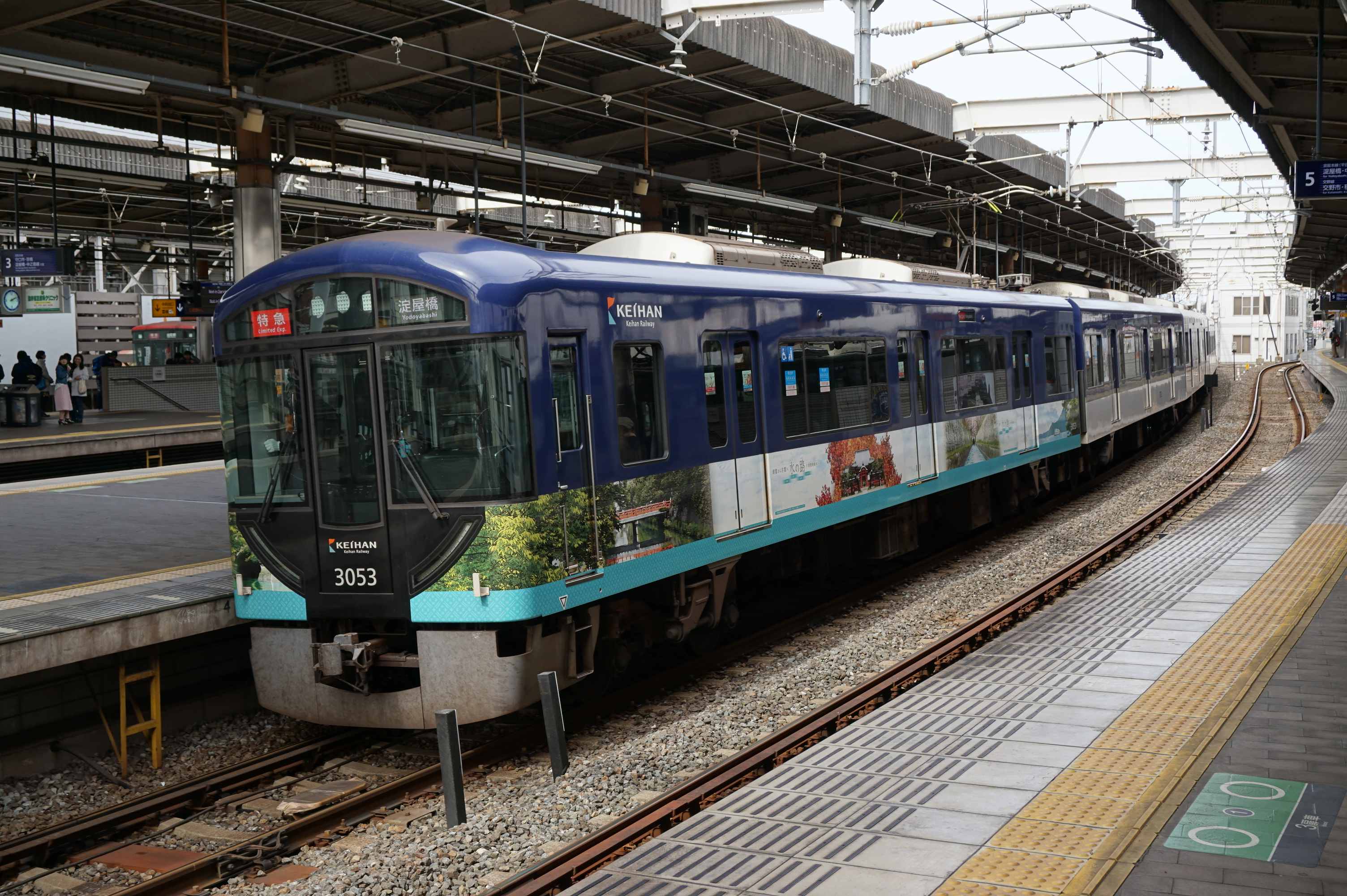 「水の路」ラッピングが施された3003F Sony ILCE-6000